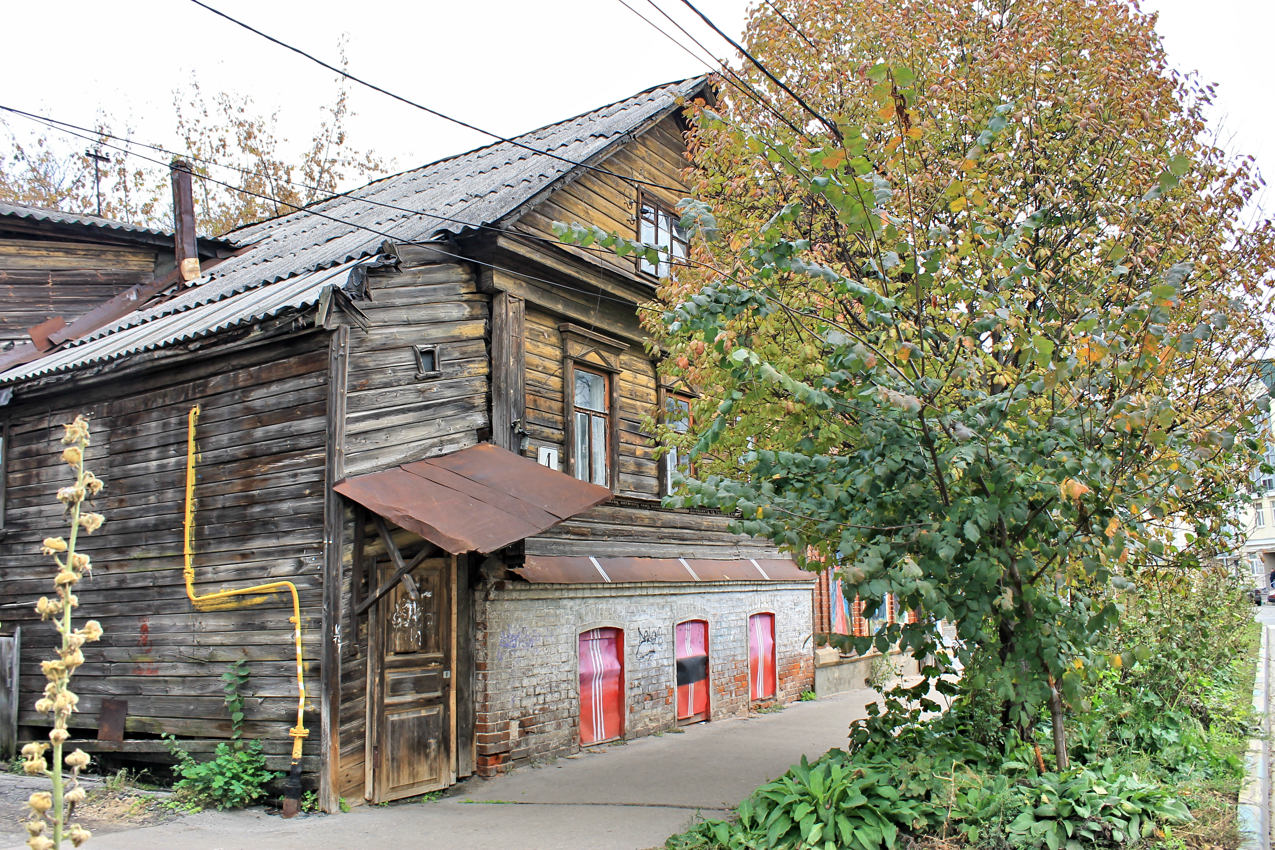 Жилой дом: улица Славянская, 4, Нижний Новгород, Нижегородская область, построен в 1888 году